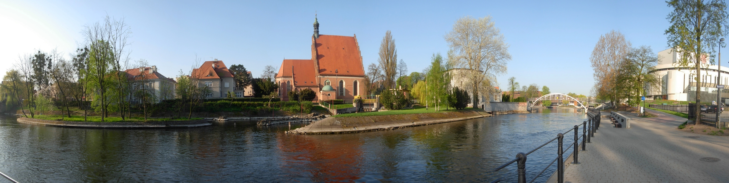 Południowe nabrzeże Brdy w centrum Bydgoszczy